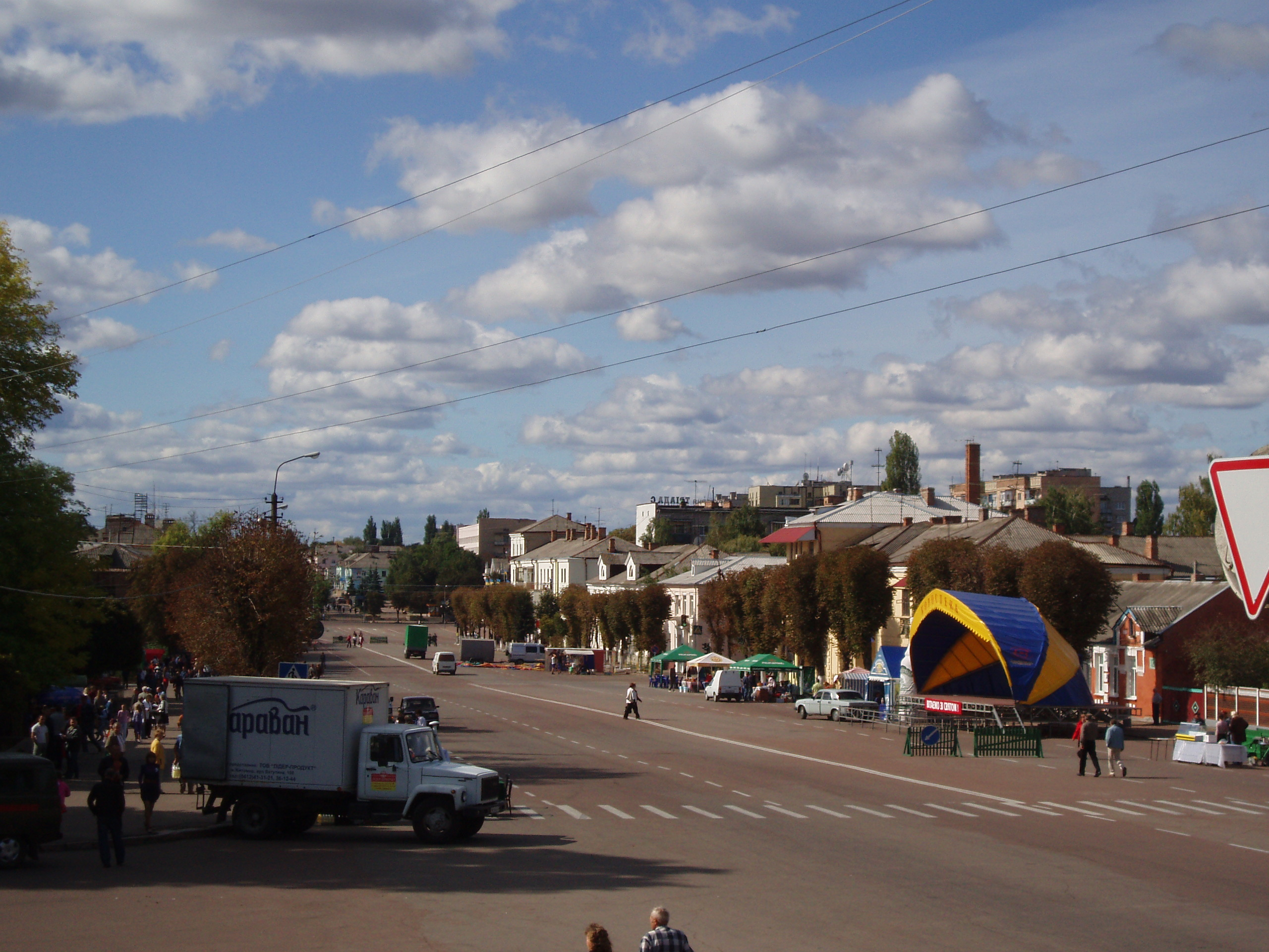 Korosteņas pilsētas centrālā Hruševska iela